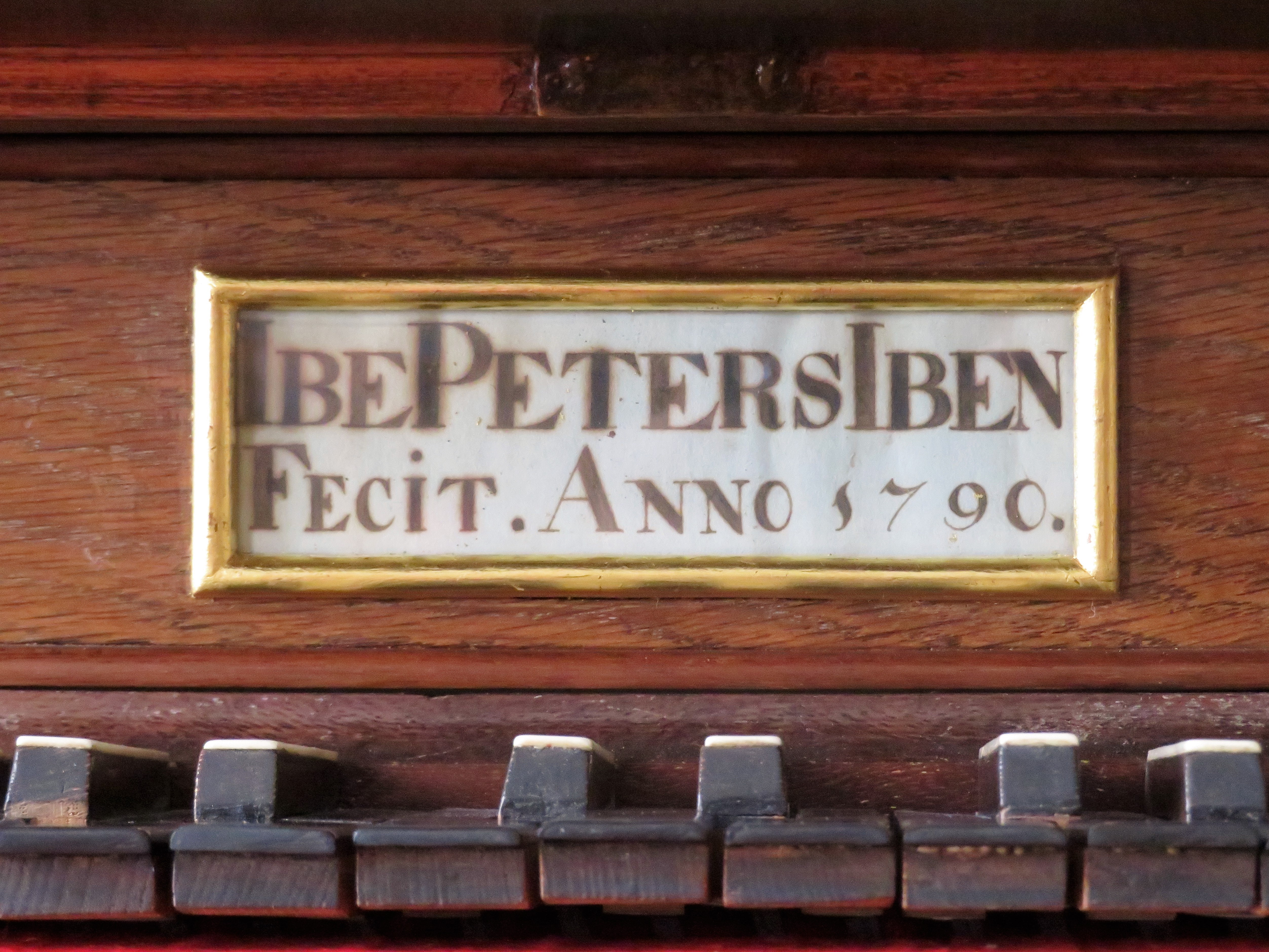 Firmenschild des Orgelbauers Ibe Peters Iben an seiner im Jahr 1790 erbauten Kabinettorgel, fotografiert im Orgelmuseum Organeum in Weener